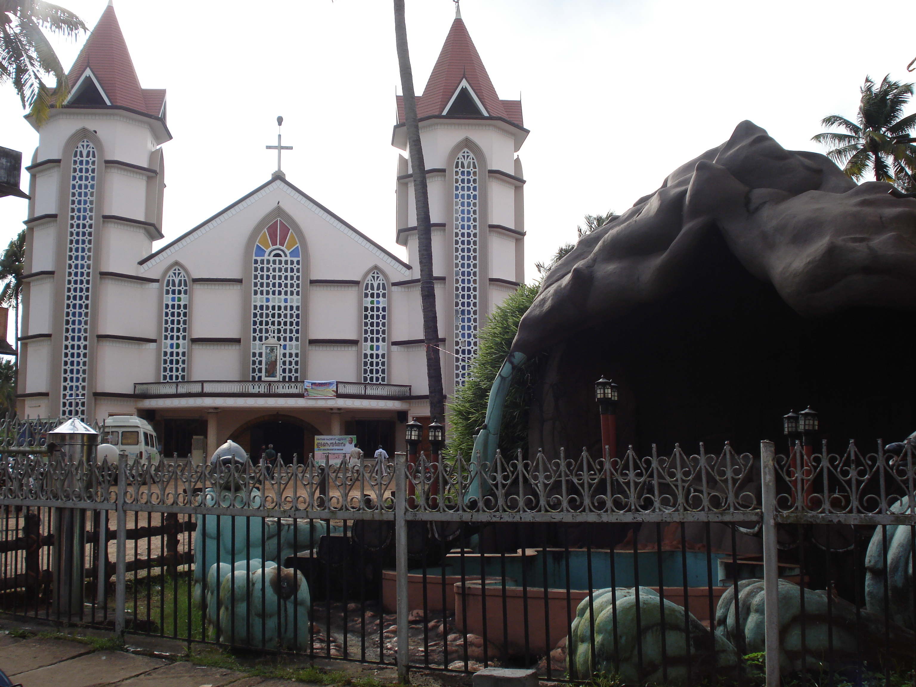 St.Joseph's Church, Kodakara